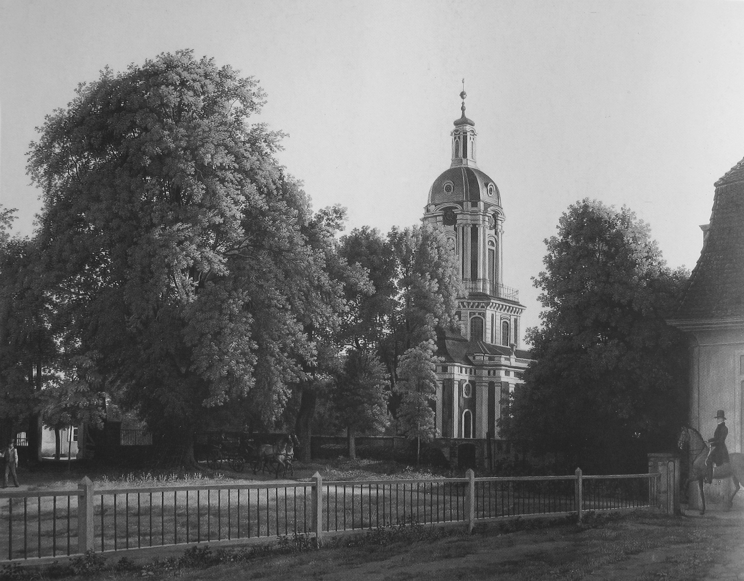 Die Kirche im Park von Schloss Buch; Buch bei Berlin/Preussen/Deutschland